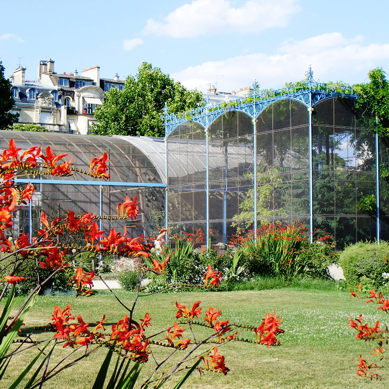 la grande volière (1860)